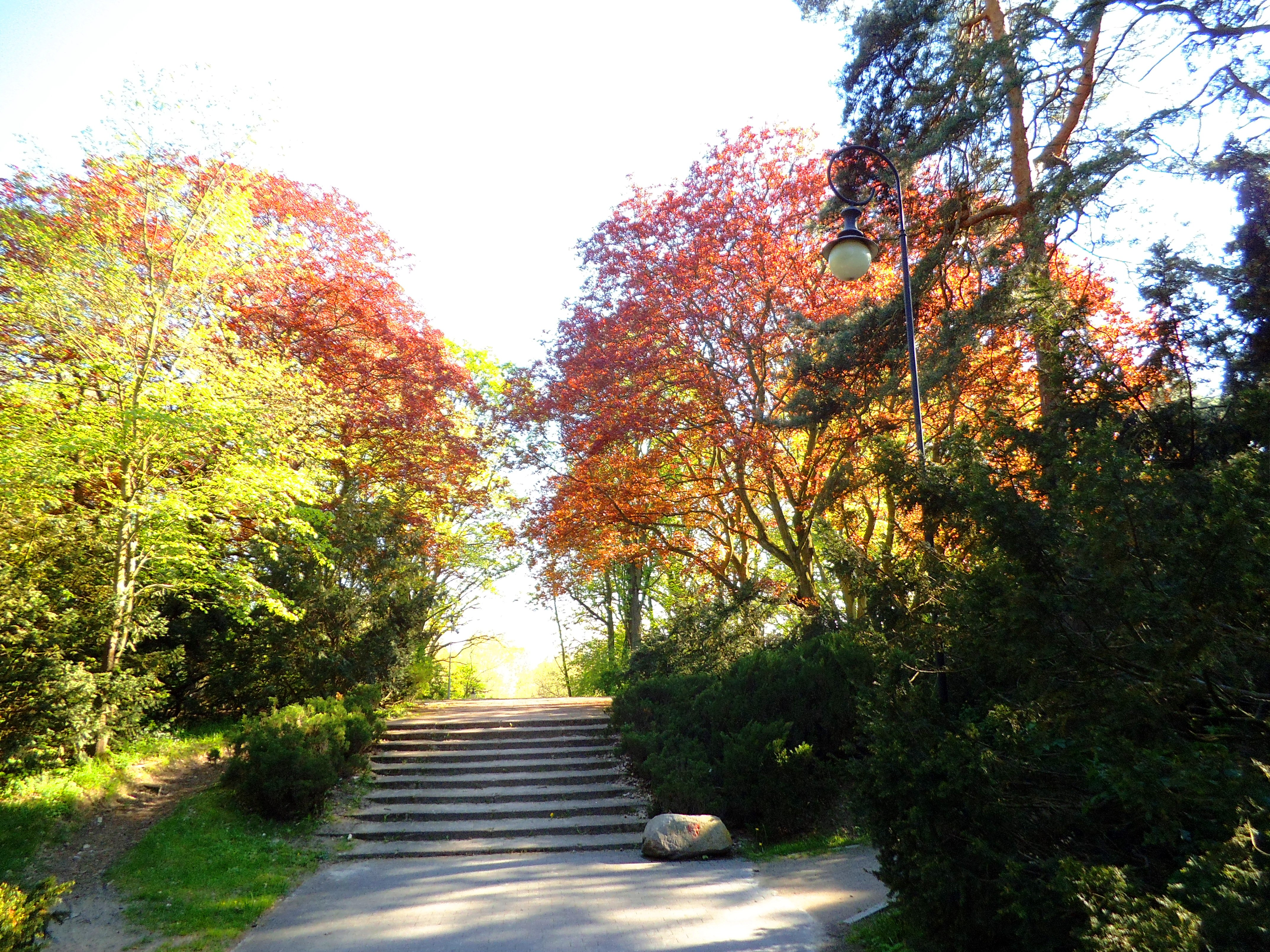 Park Miejskie w Toruniu, wiosna